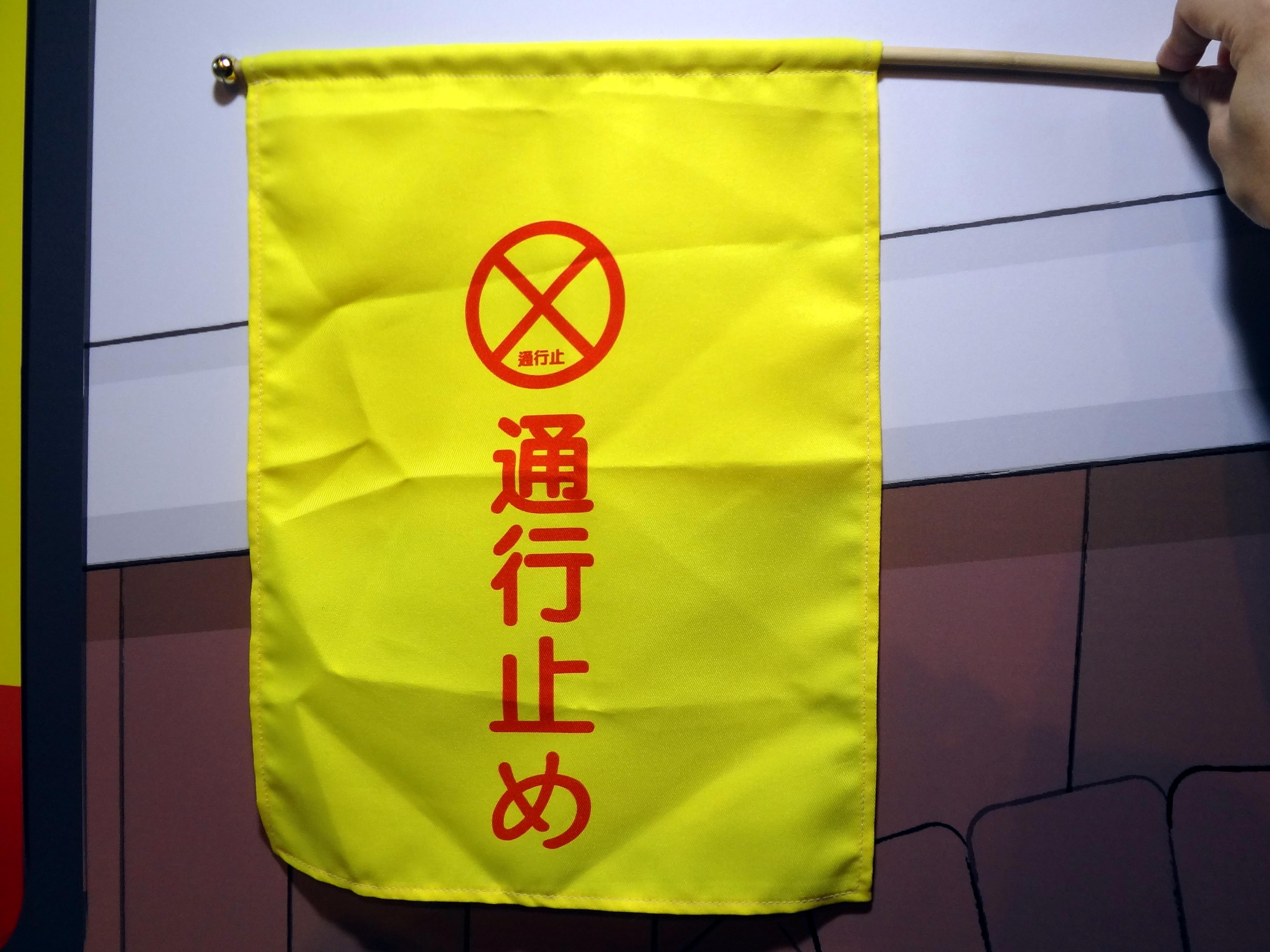 三創數位生活園區一樓「刀劍神域立方幻境特販展」，《工作細胞》血小板「禁止通行」黃旗。